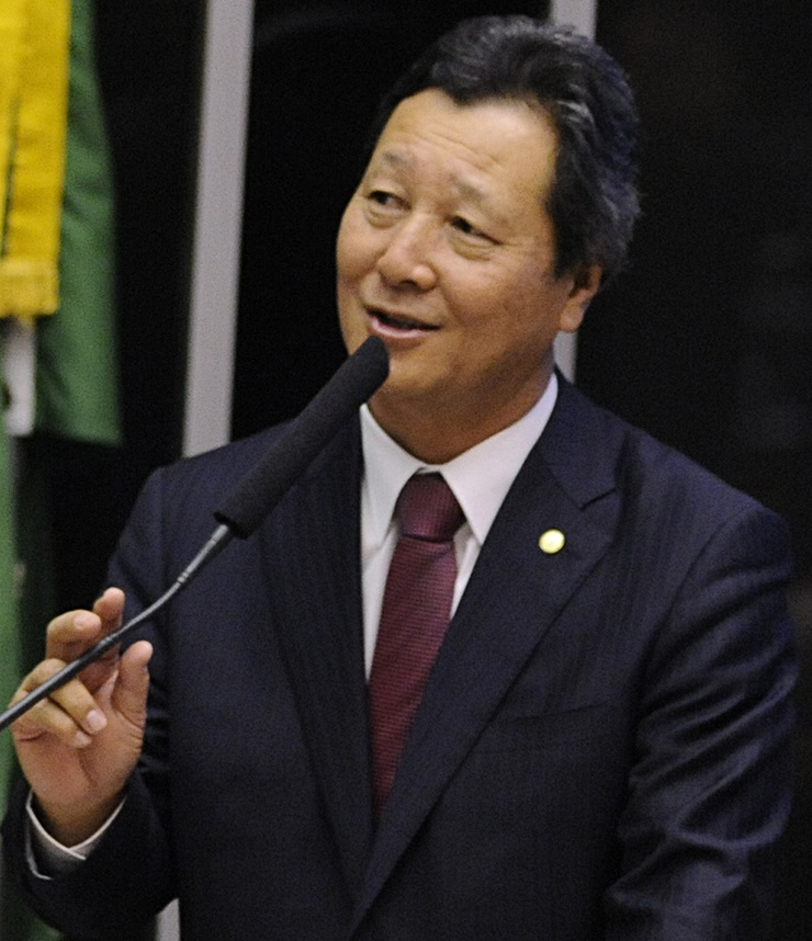 Luiz Nishimori em novembro de 2015.